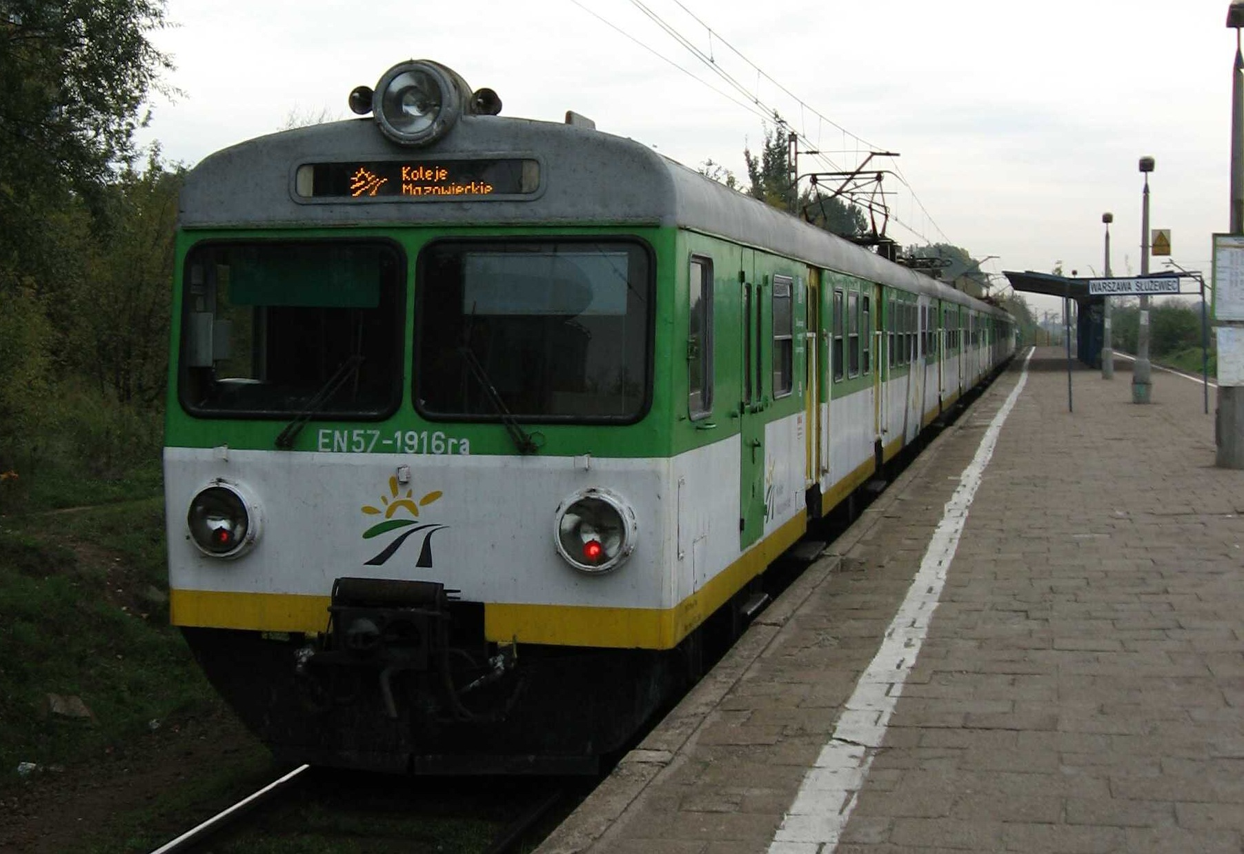 EN57 electric multiple unit in Koleje Mazowieckie colours